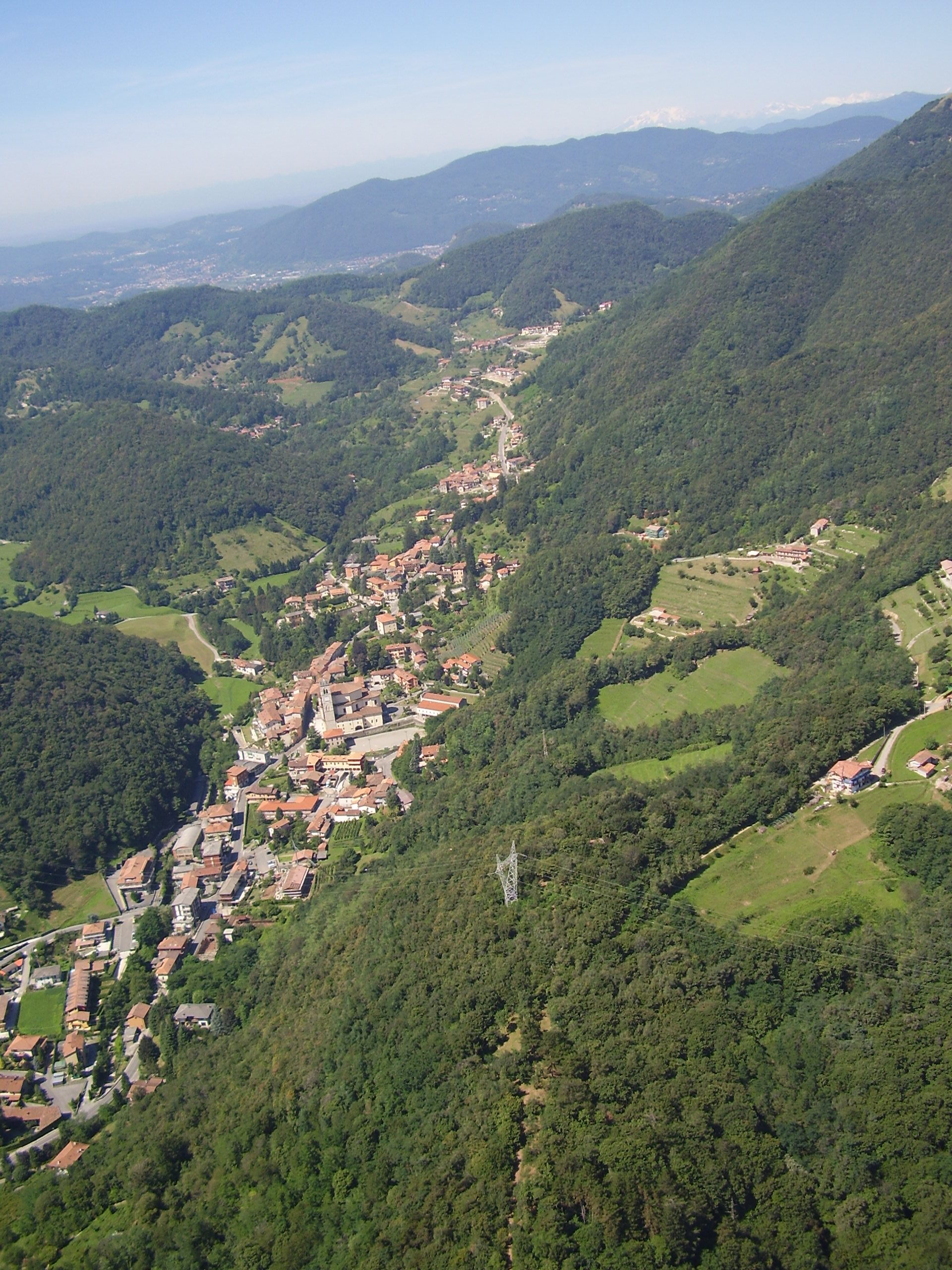 Vista aerea di Palazzago (Bergamo)